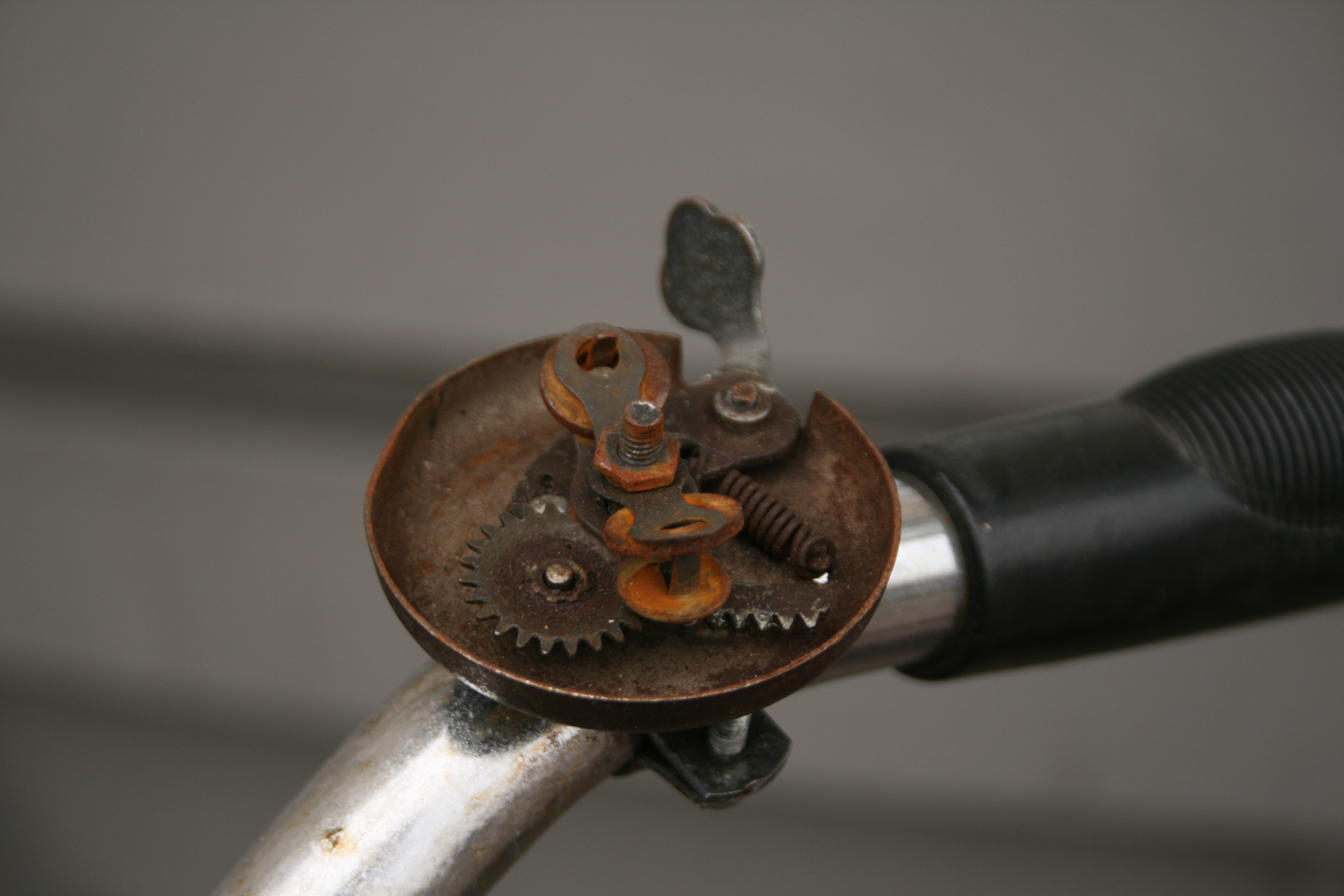 bike bell mechanism